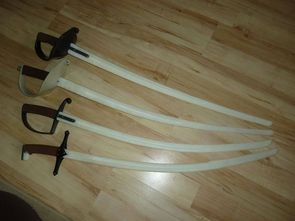 Saját készítésű poliamid szablyákPolyamide Sabres